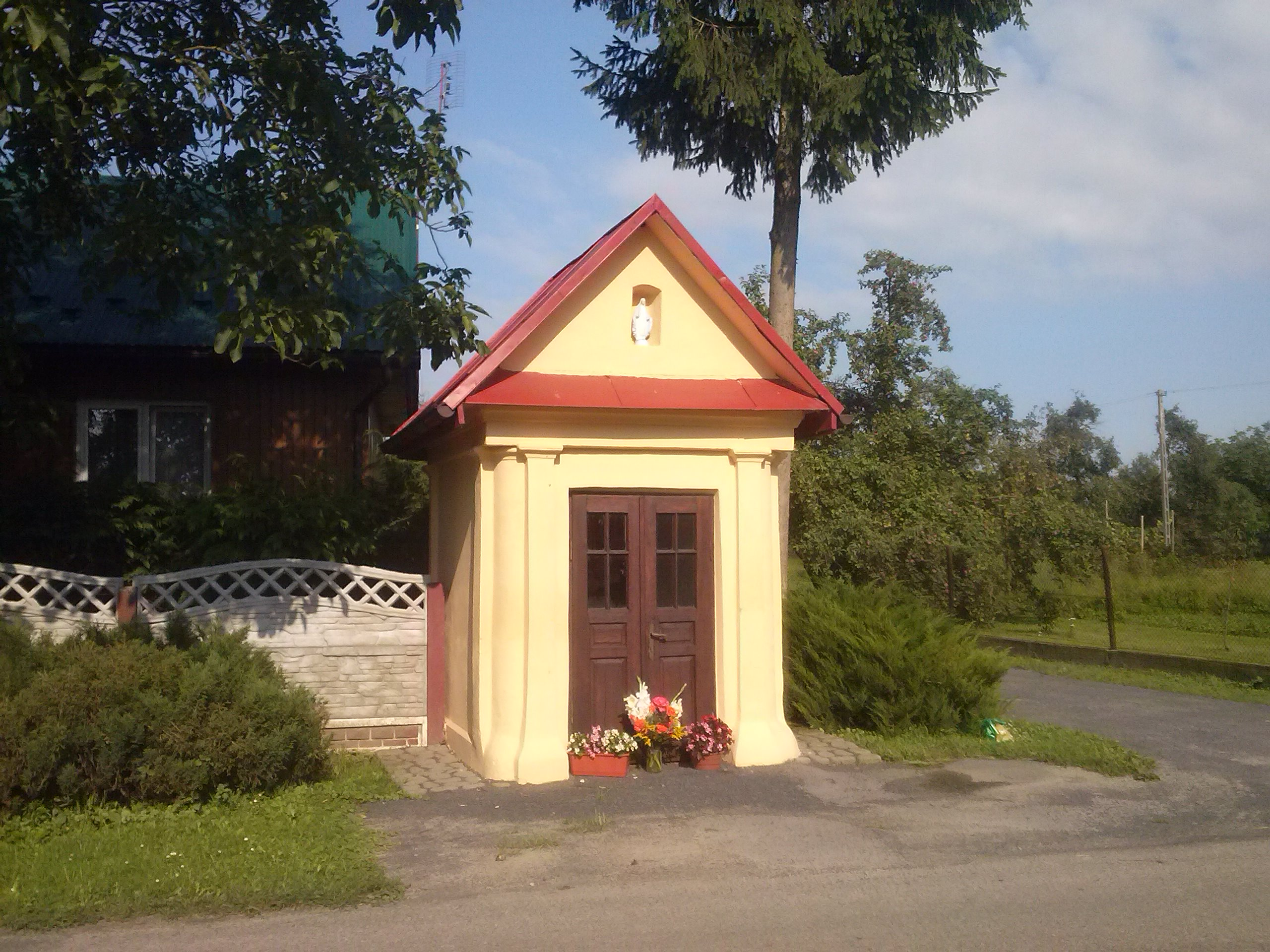 Kapliczka Matki Bożej w Głogowcu